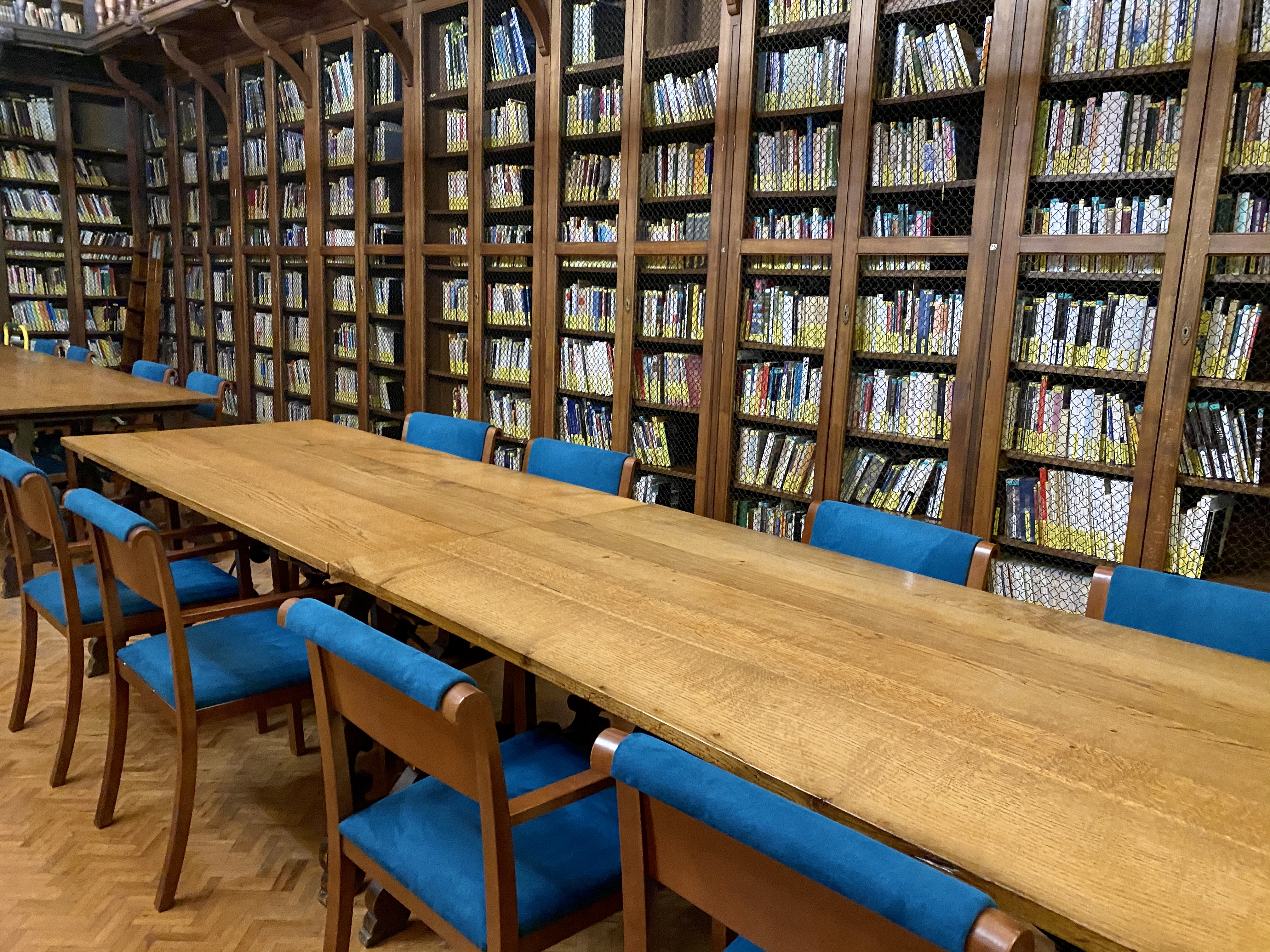 Biblioteca de Cort en desembre 2019